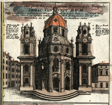 Salzburg, Kollegienkirche from: Prospectus Elegantiores Splendidissimae Archiepiscopalis Urbis Salisburgensis praecipuarumque in ea Illustrium, ac maxime mirabilium, tam Sacrarum quam profanarum Aedium